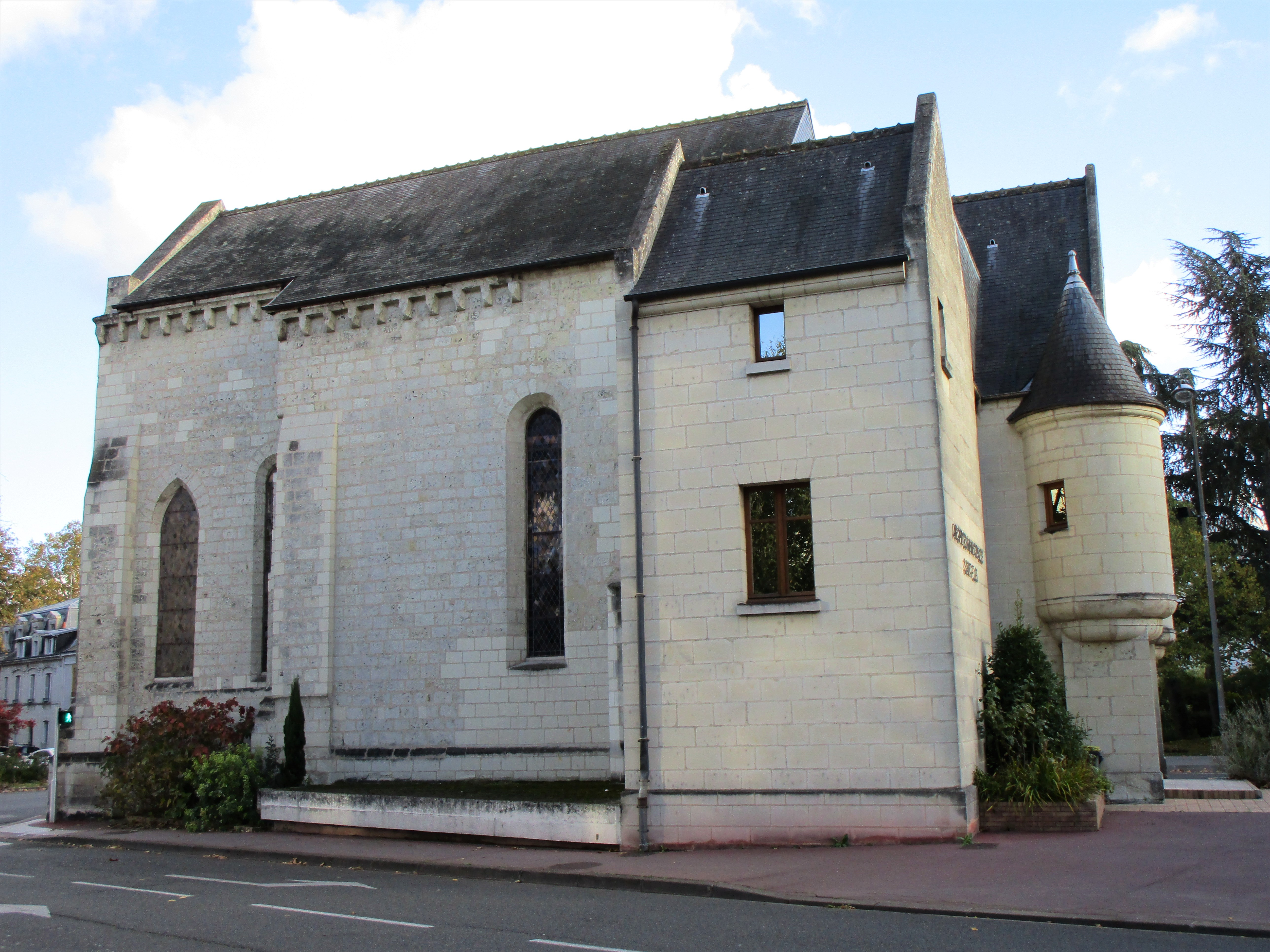 L'ancienne brasserie de la Chapelle Saint-Eloi, aujourd'hui archives municipales de Tours.